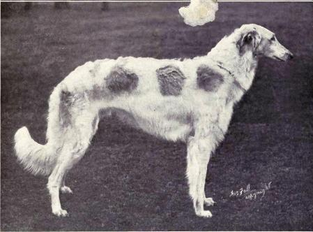 Borzoi from 1915